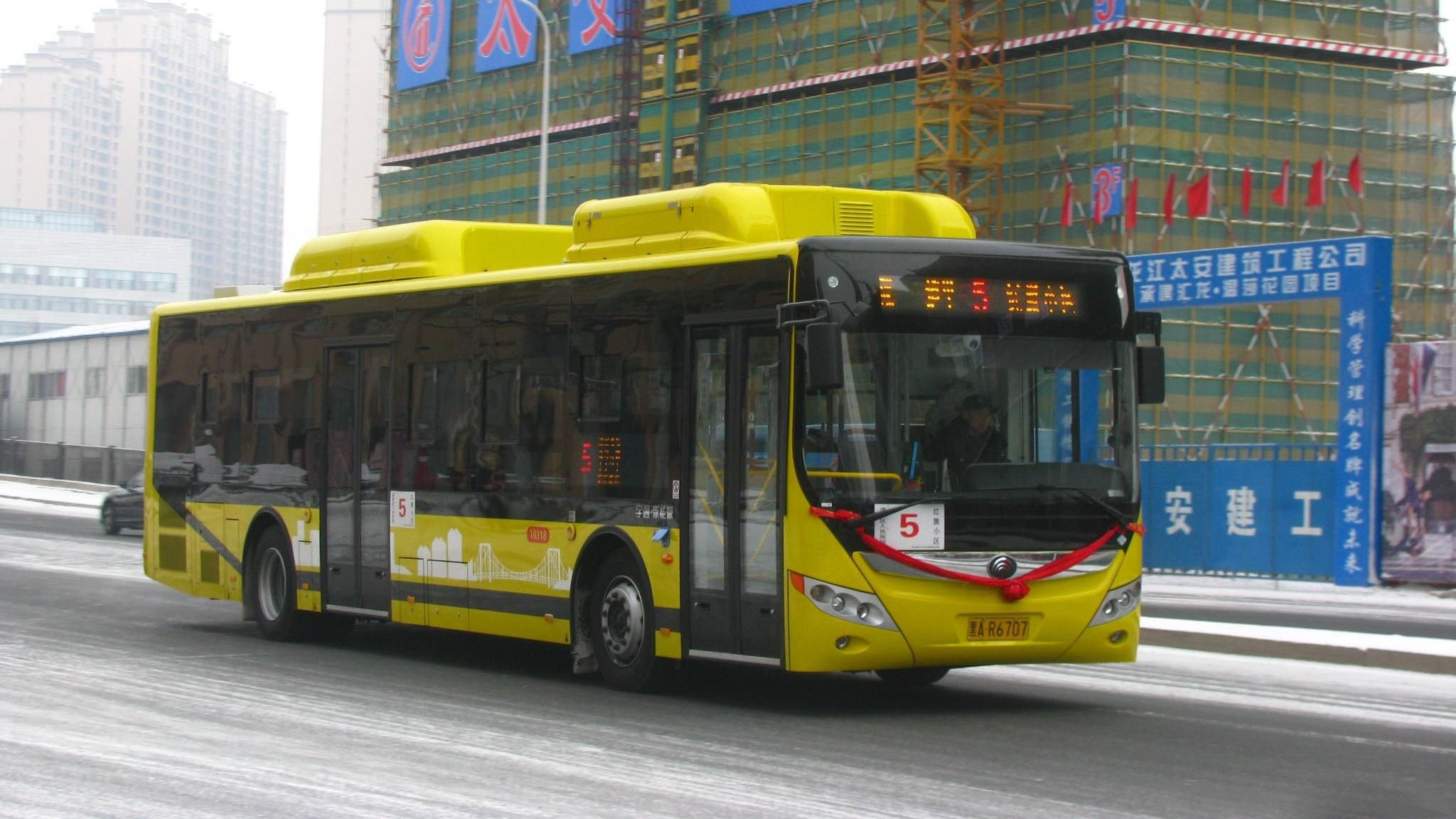 ZK6125CHEVNPG29型城市巴士（自2017.12.5至今用于哈尔滨5路）